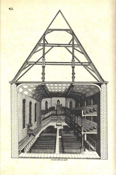 Aufriss der Lutherischen Kirche in Hanau, von 1658 bis 1664 mit einem Hängewerk-Dachstuhl für größere Spannweite errichtet, erstmals abgebildet in der 2. erweiterten Auflage des ersten deutschen Lehrbuchs für Holzbaukunst "Architectura Civilis" von Johann Wilhelm, Frankfurt 1662